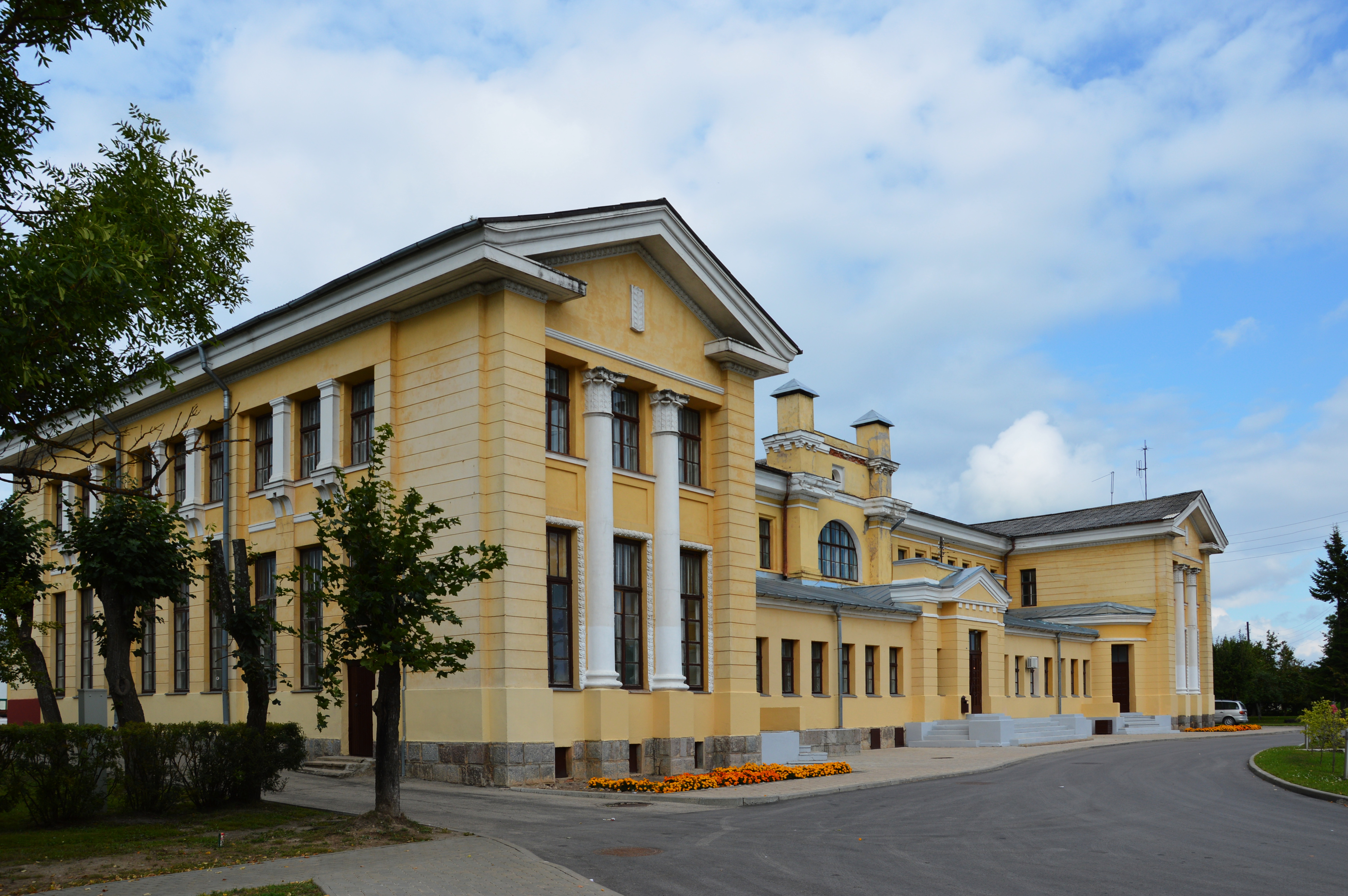 Gulbene raudteejaam